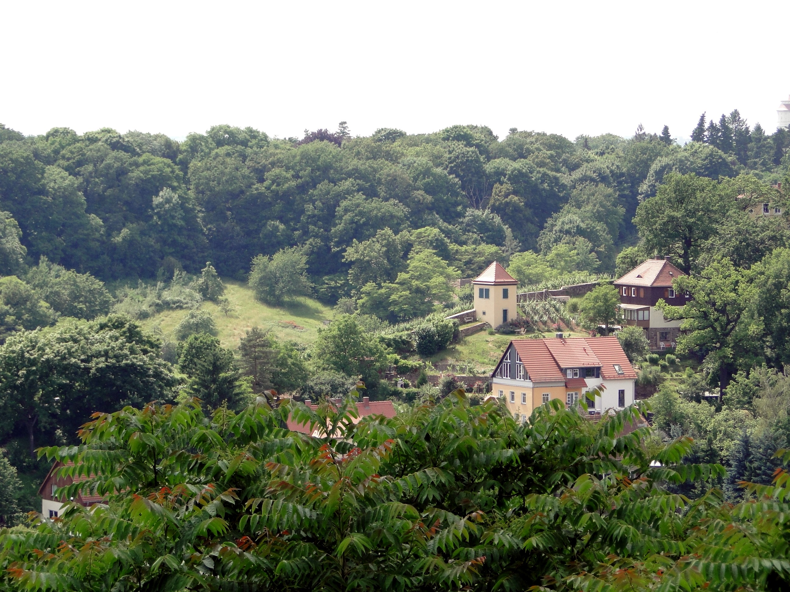 Weinberg Jägerhofstraße Radebeul vom Pfeifferweg aus gesehen